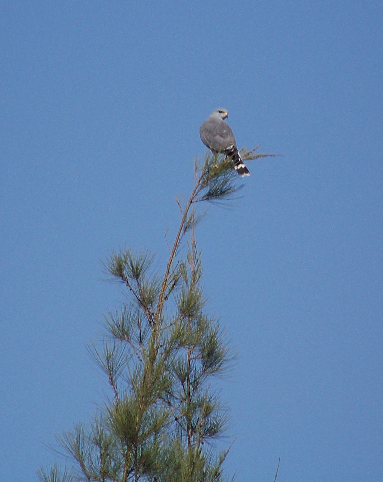 Busardo Gris Buteo plagiatus en el Lago de Atotonilco el Bajo, Jalisco